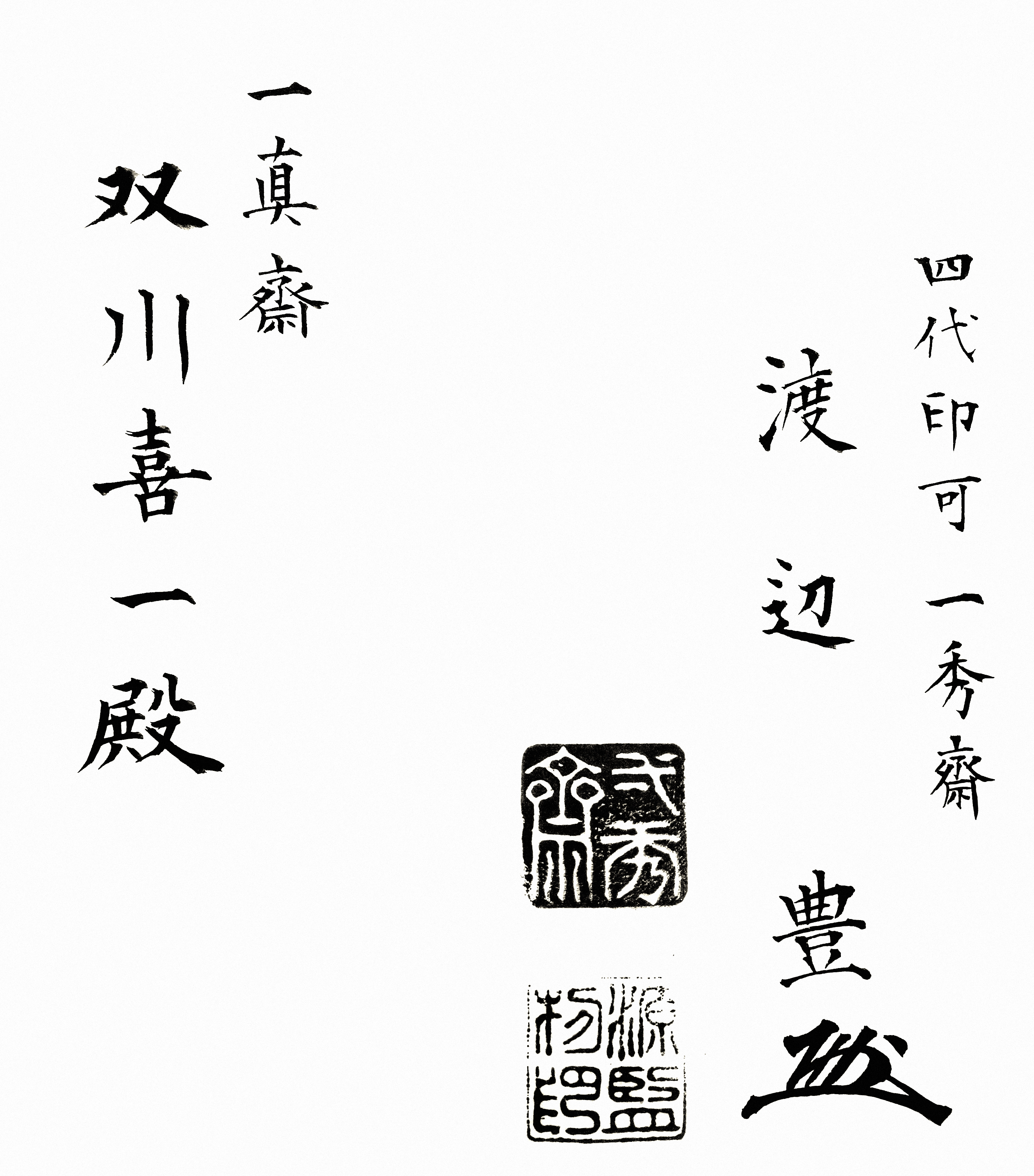 双川喜一宛の文書（白黒）